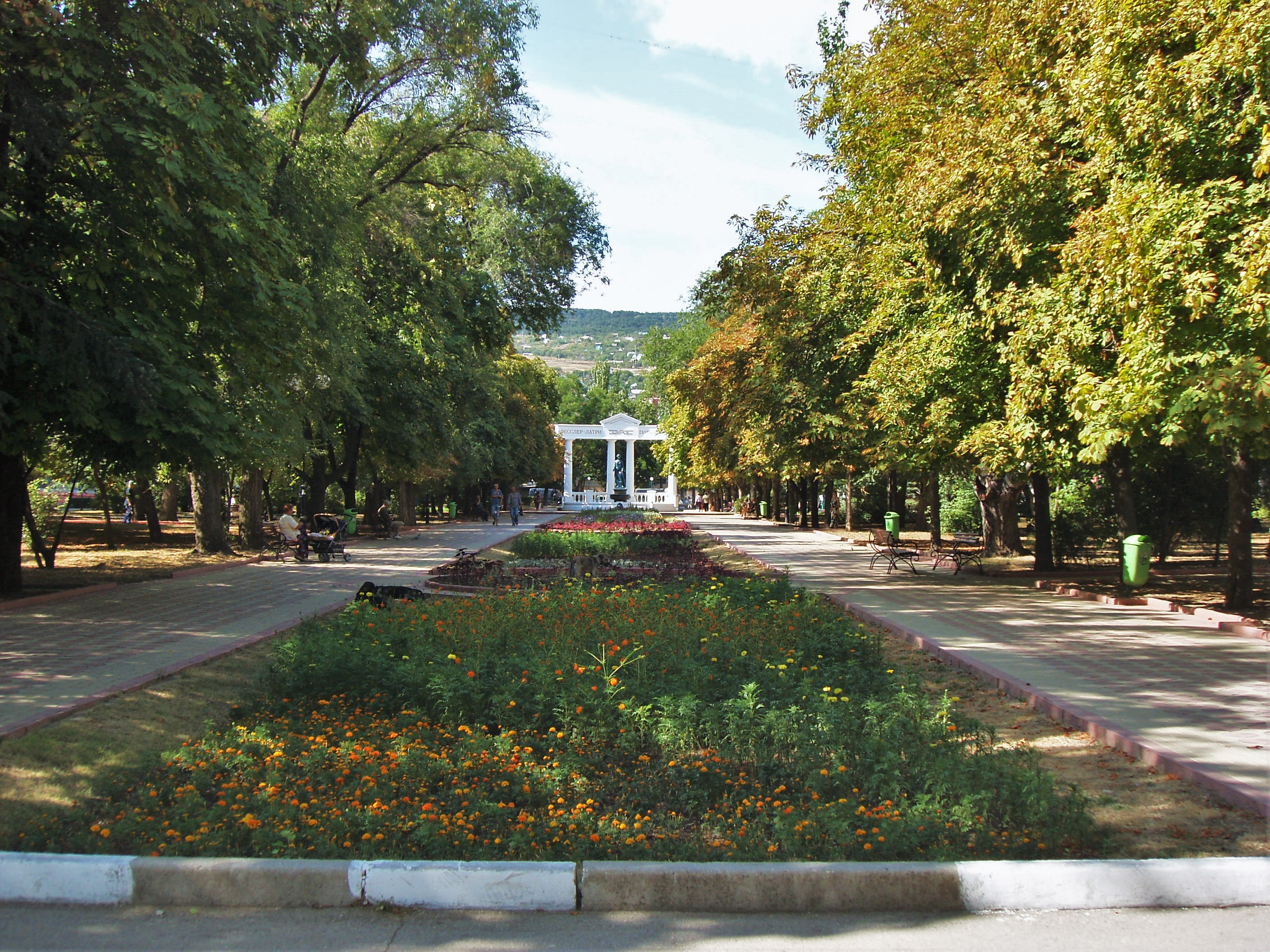 Феодосия. Юбилейный парк